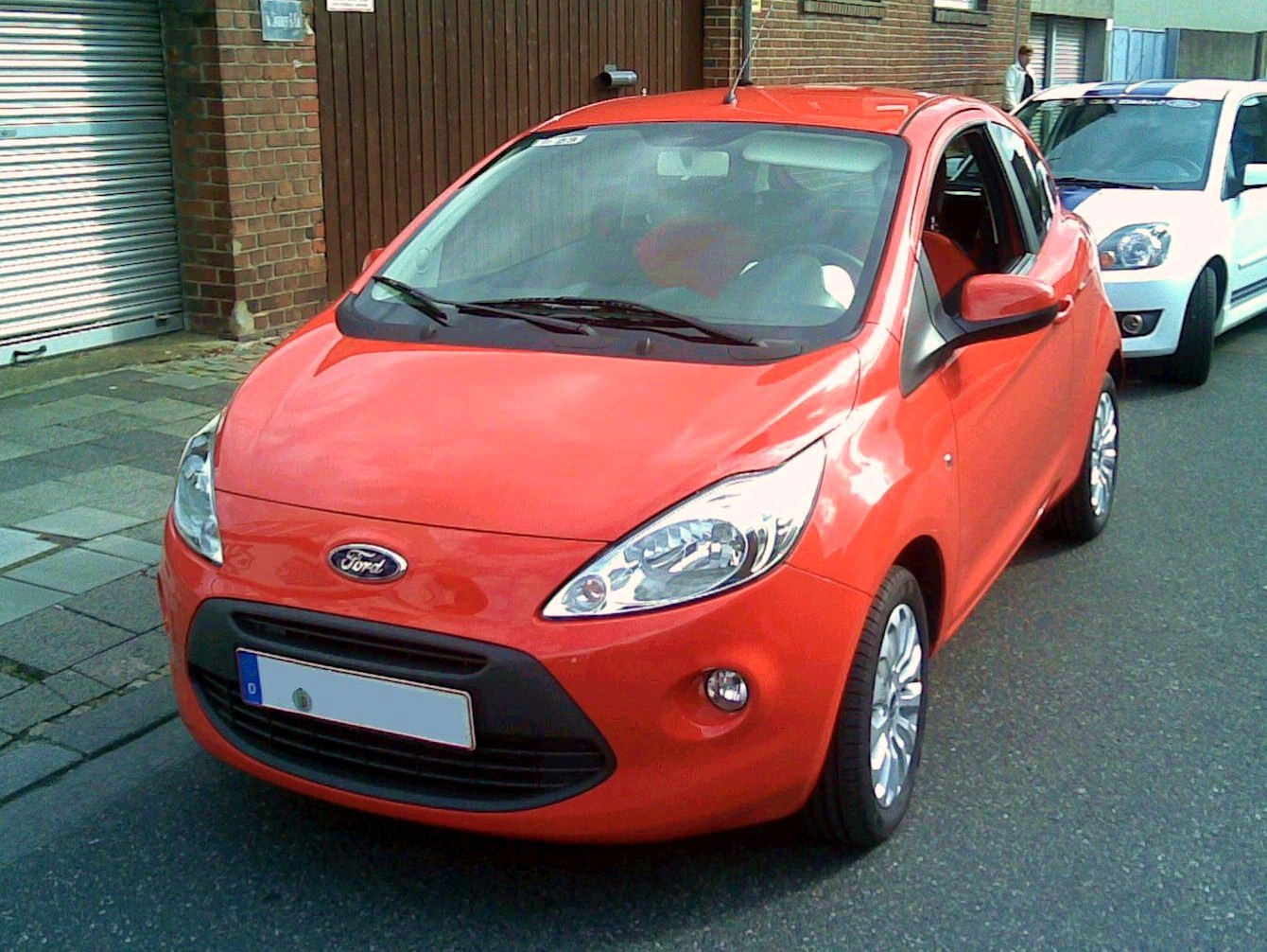 Ford Ka, Modell 2009